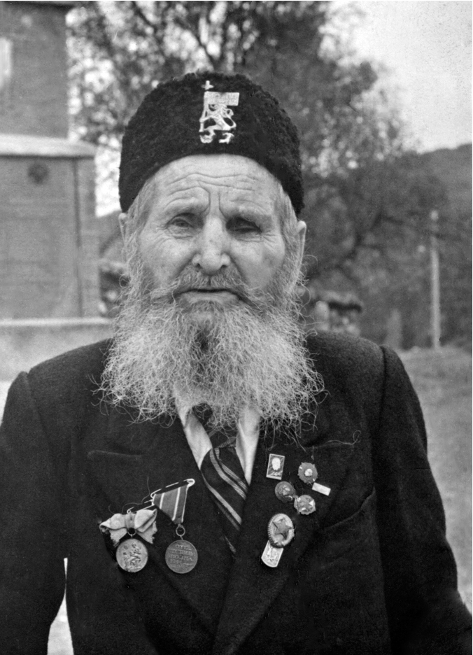 Революционерът Стойчо Дачев Стойчев – „Крилат Стойчо“